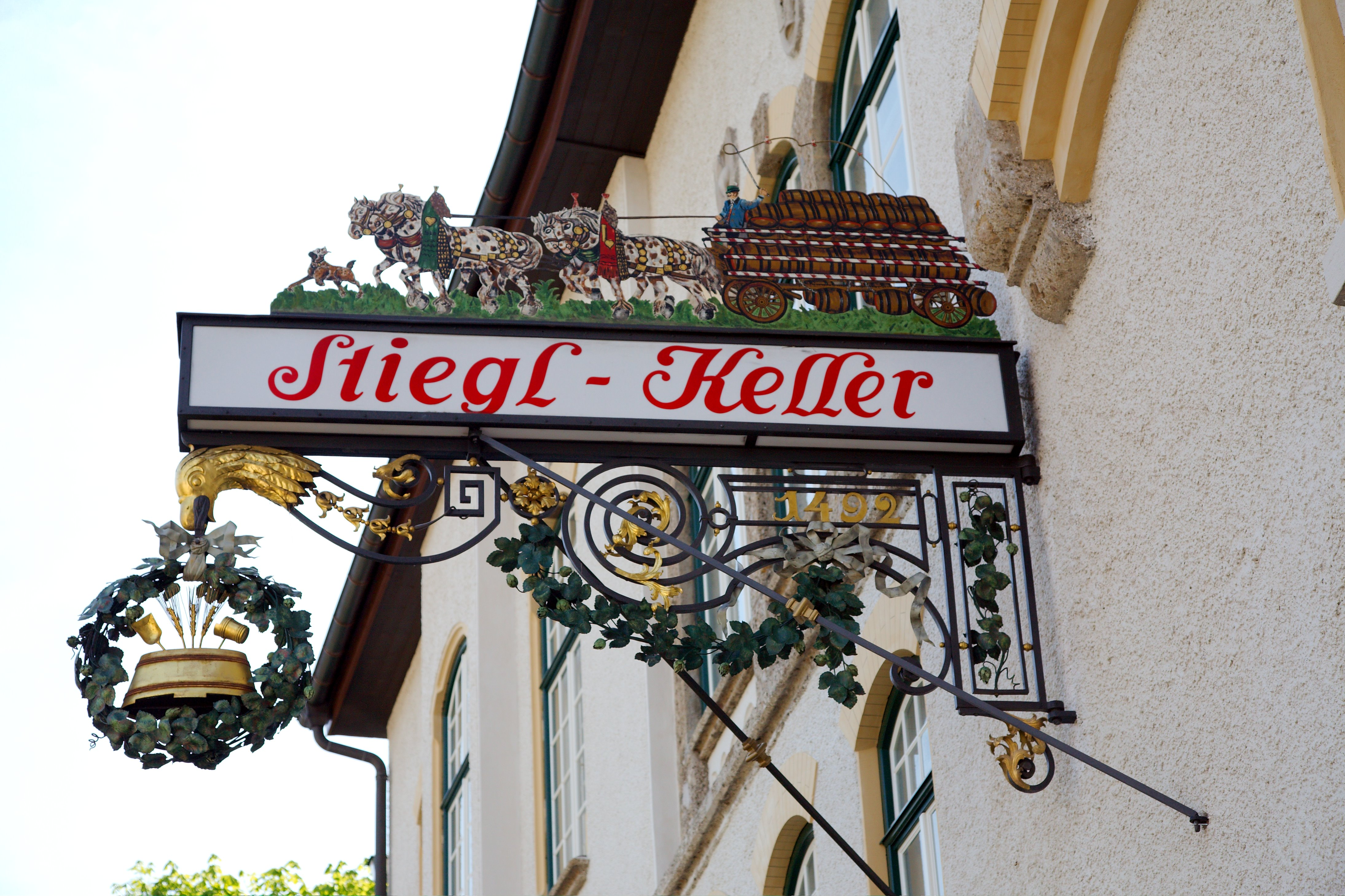 Sign of Stieglbrauerei